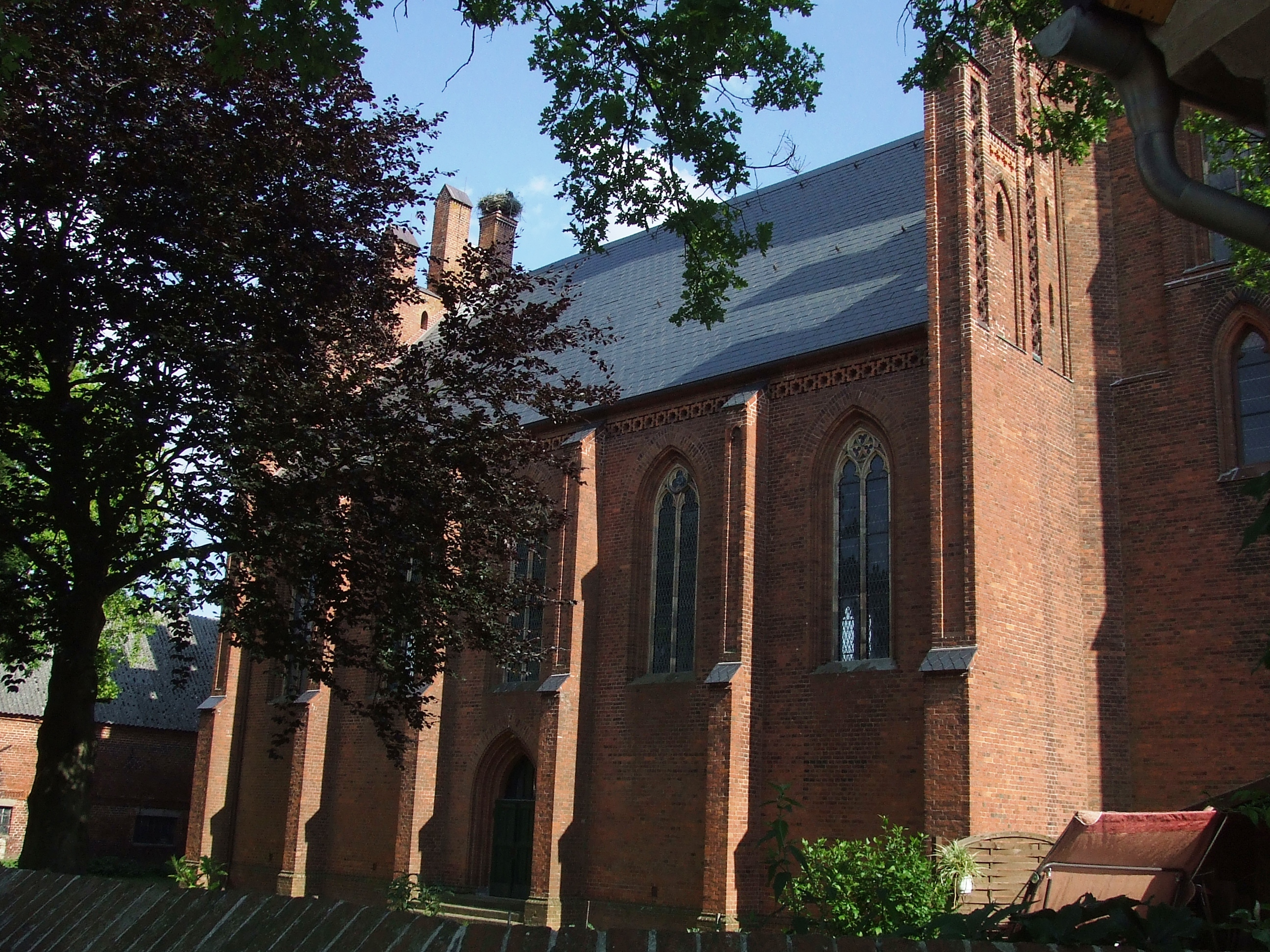 Kirchenschiff außen Stüdenitz